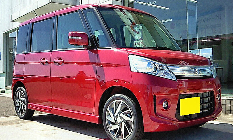 スズキ スペーシア カスタム TS フェニックスレッドパール（ZLB）